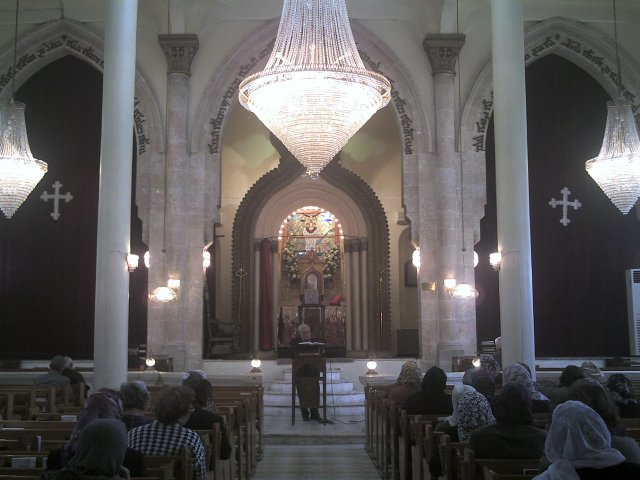 Aleppo, Syria.